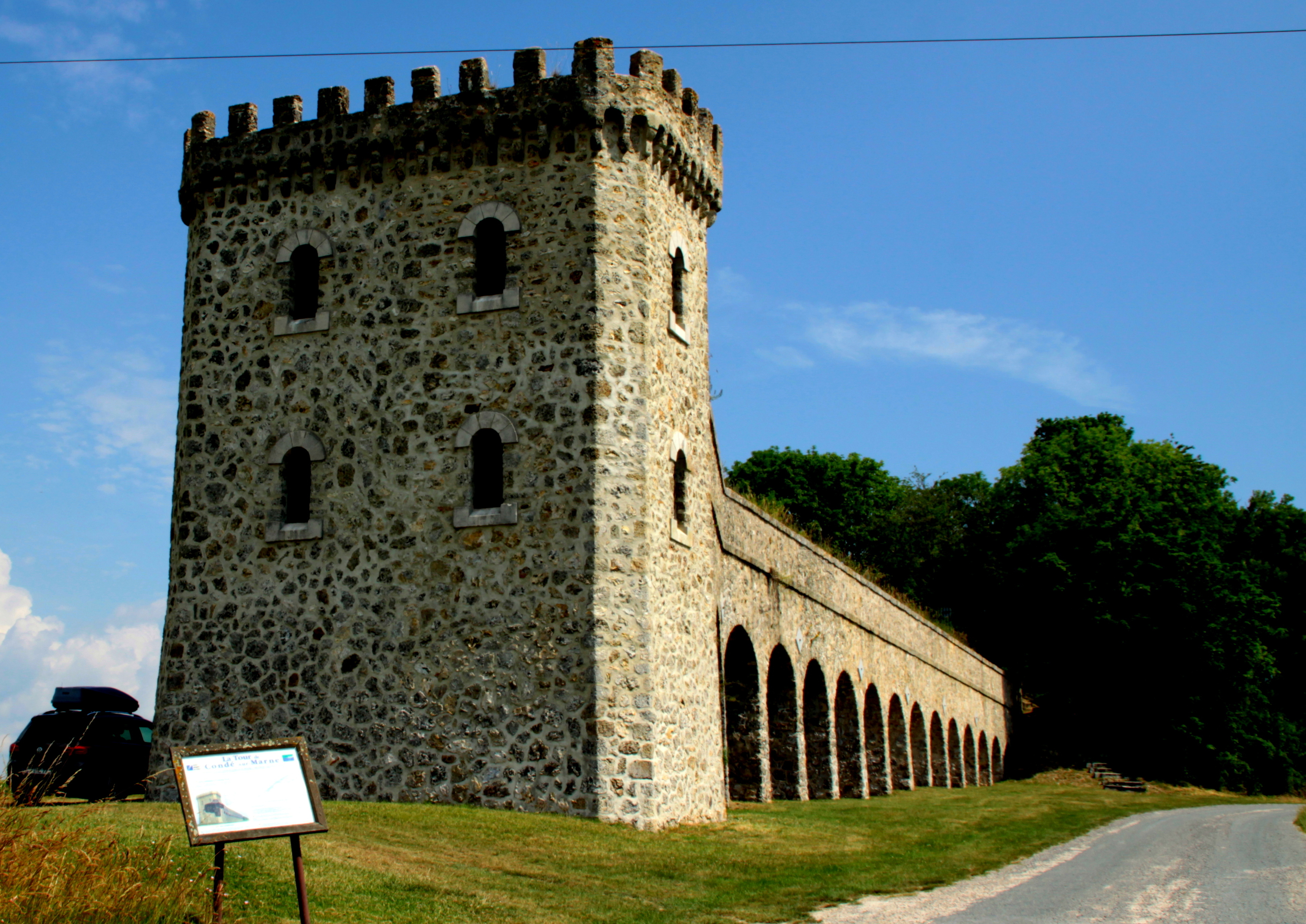 Den Tuerm zu Condé-sur-Marne